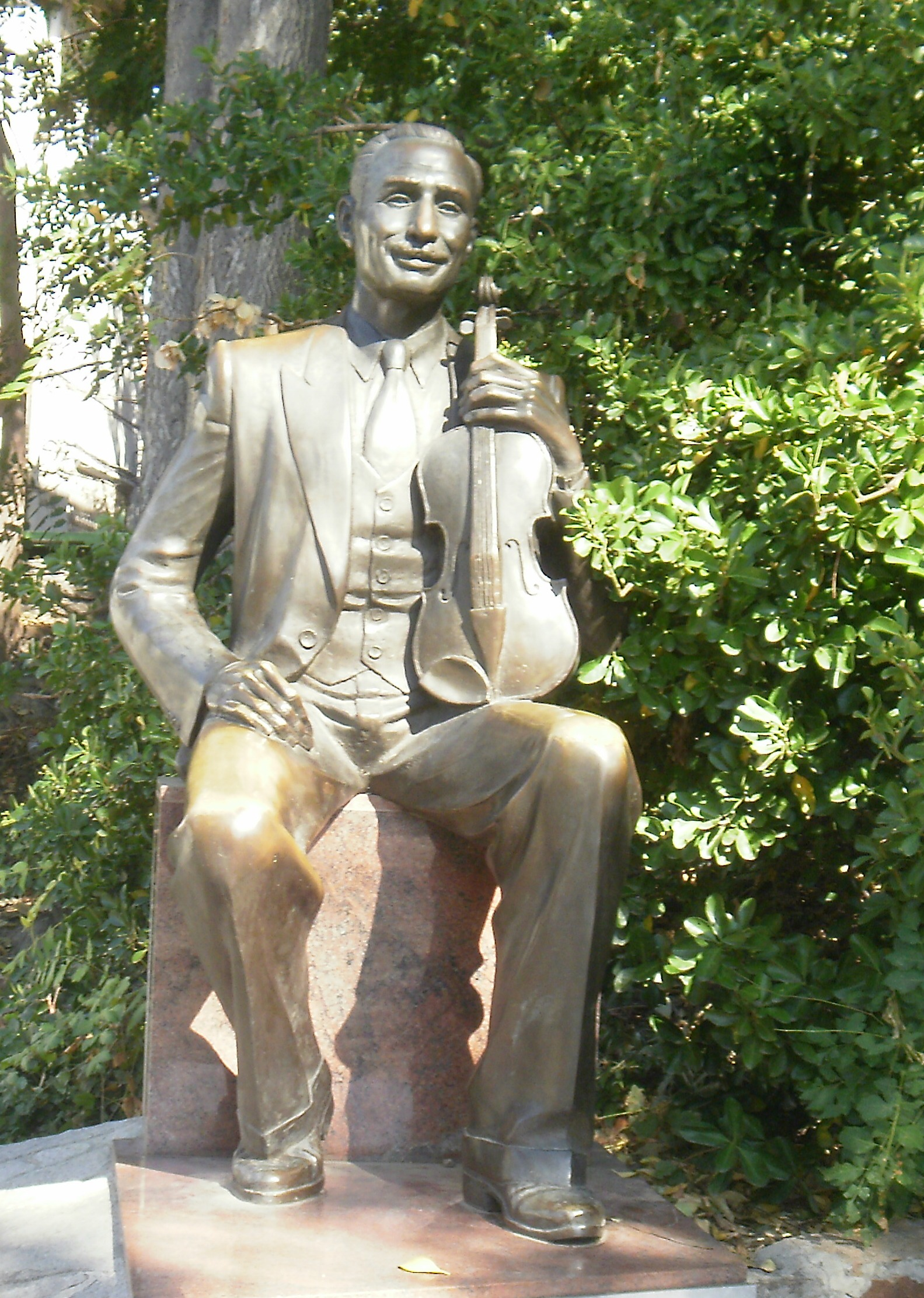 Паметника на Александър Николов, по-известен като Сашо Сладура в Пловдив.